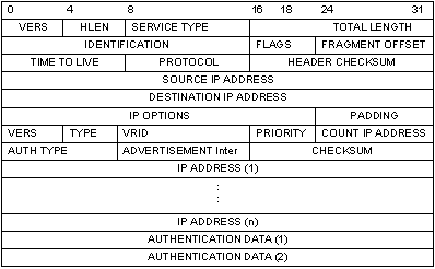 Монгол: flakgdlksfjdk